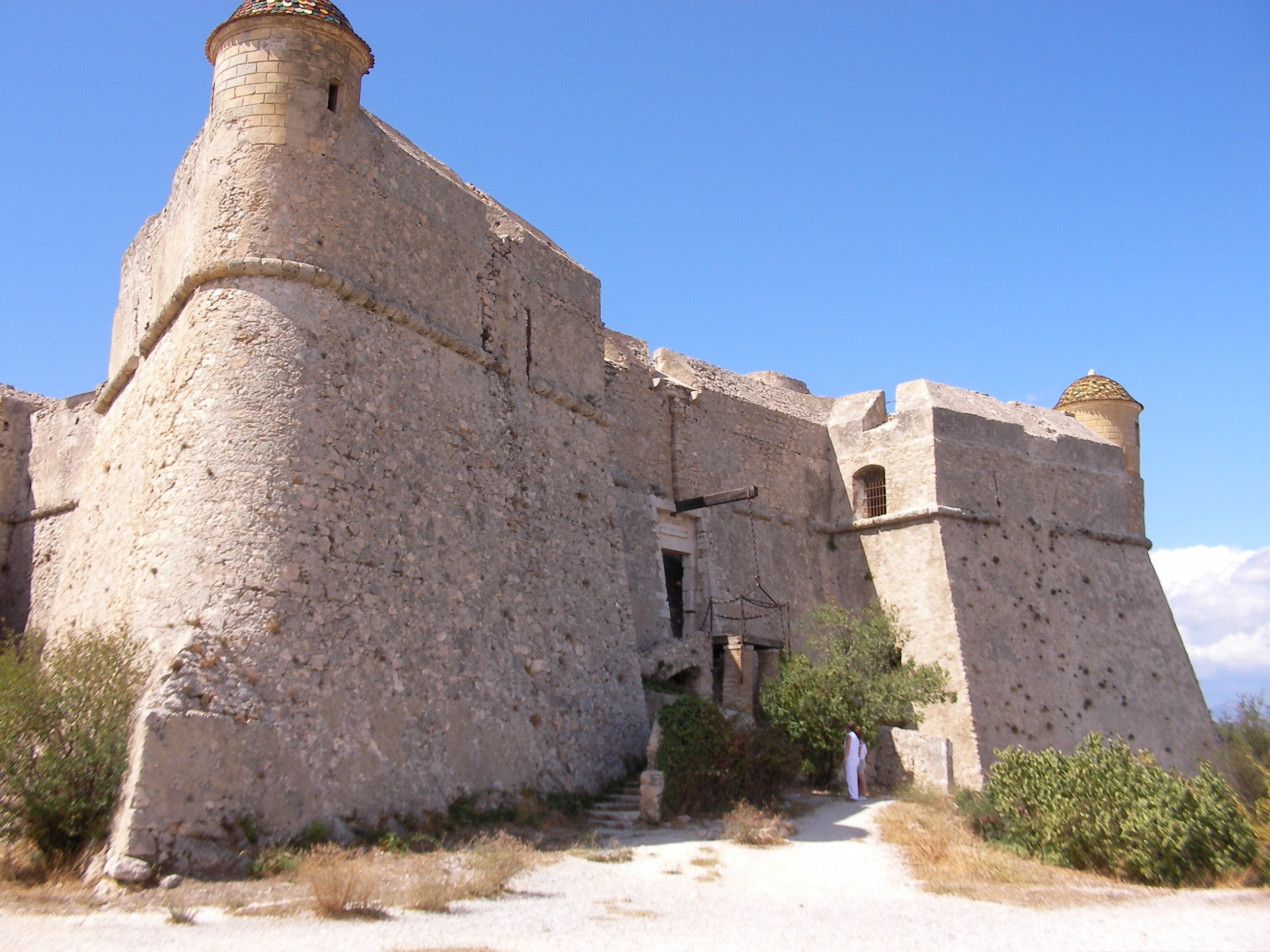 Fort du Mont Alban in Villefranche-sur-Mer (Frontansicht)